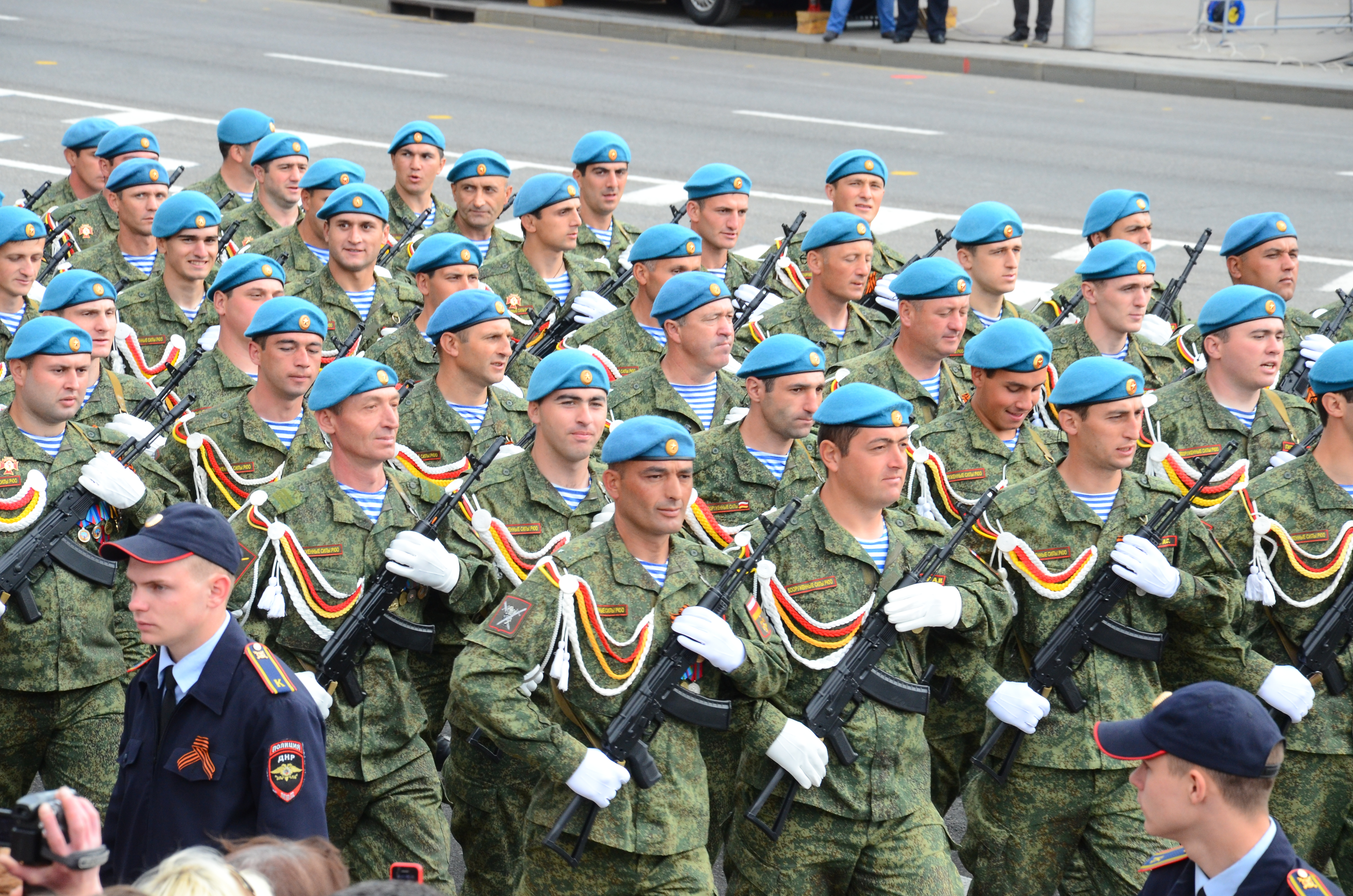 День Победы в Донецке